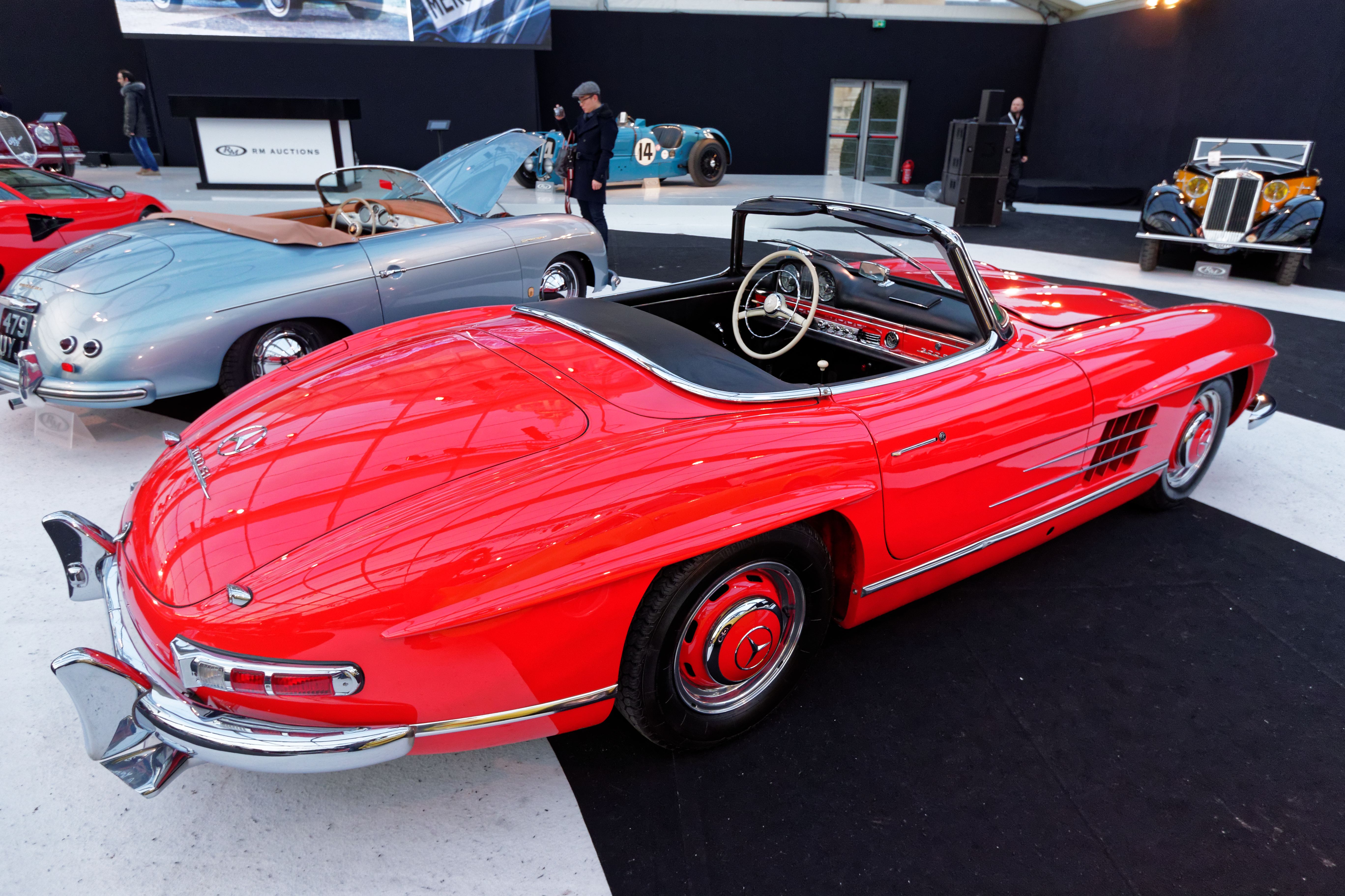 La vente aux enchères RM auctions aux pied des Invalides à Paris le 4 février 2015.